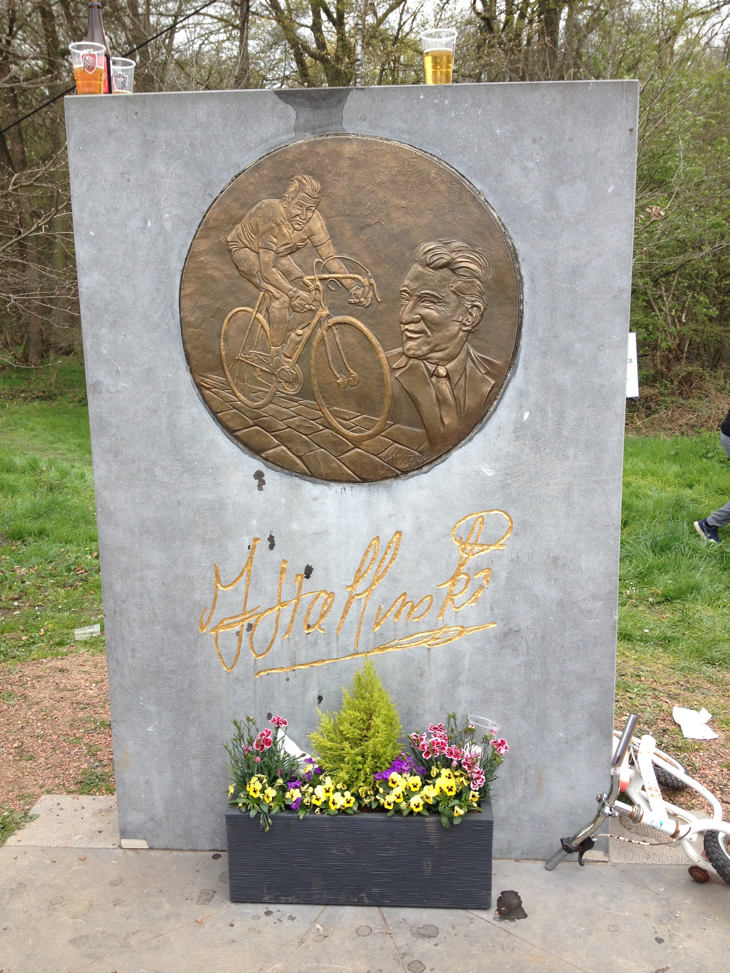 Monument van Jean Stablinski bij de doorkomst in het Bos van Wallers-Arenberg van Parijs-Roubaix 2019.